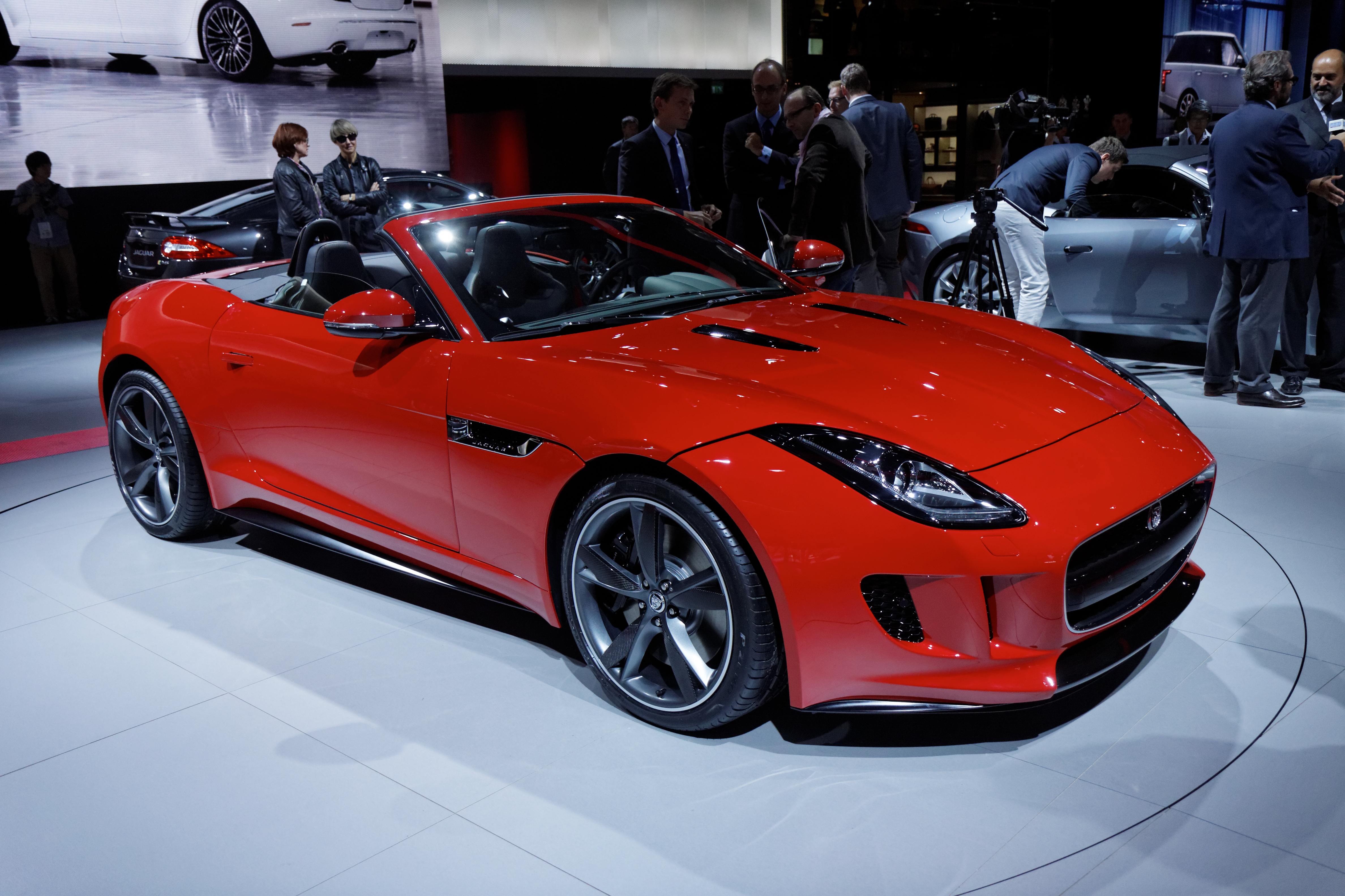 Une Jaguar F type présentée lors du Mondial de l'automobile de Paris 2012.